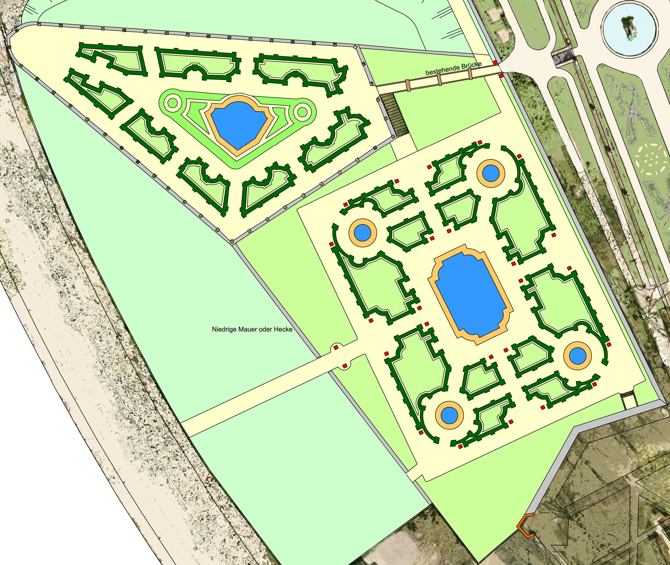 Der alte Zwergelgarten Fischer von Erlachs im Mirabellgarten der Stadt Salzburg (die 28 Standorte der Zwerge dargestellt als kleine rote Quadrate)